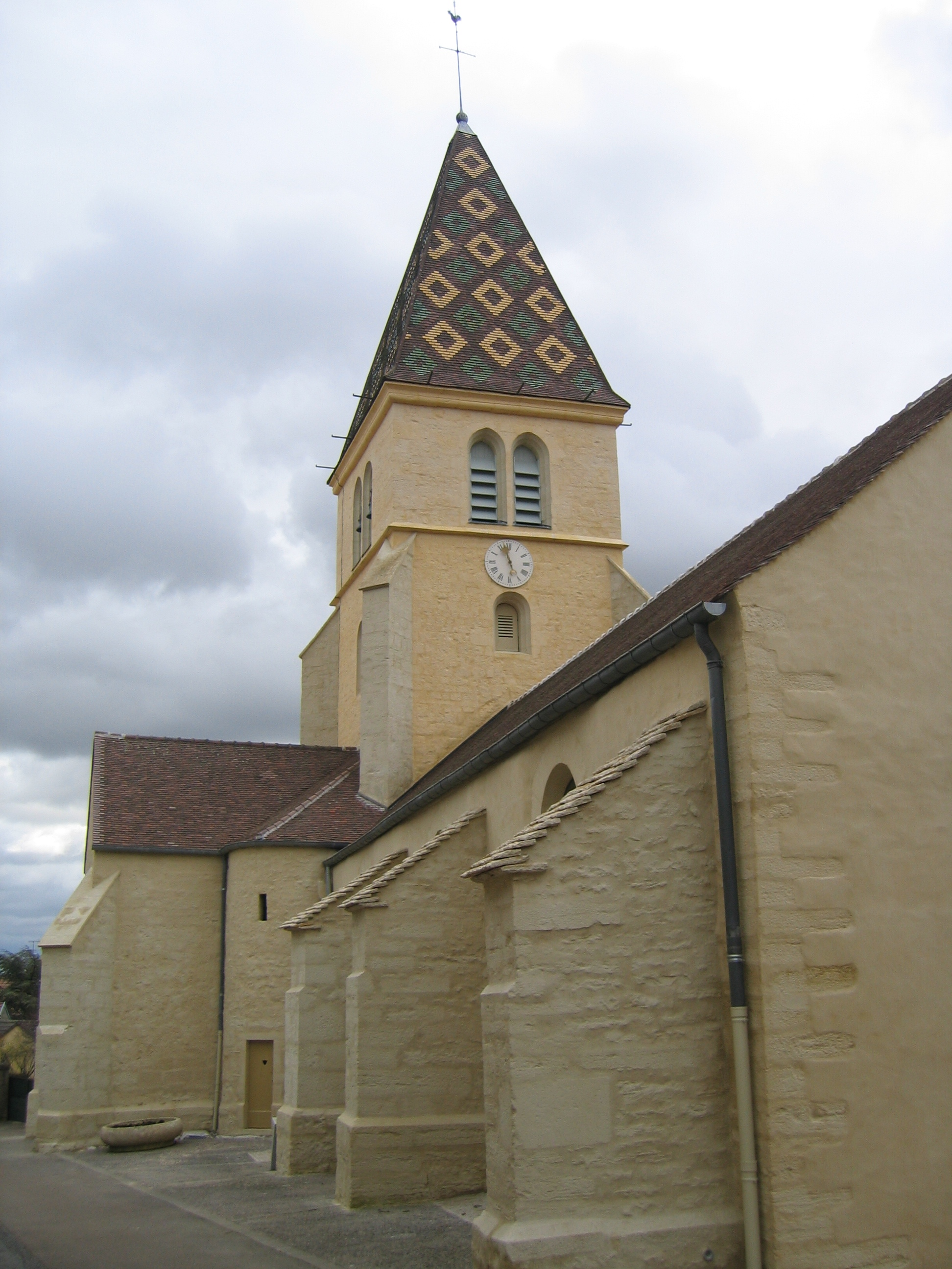 Eglise de Couchey